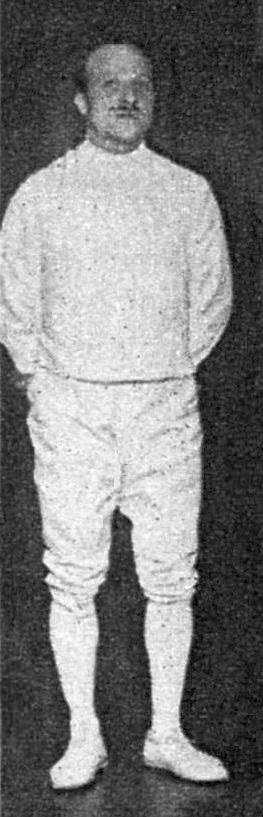 André Labat(t)ut en décembre 1926